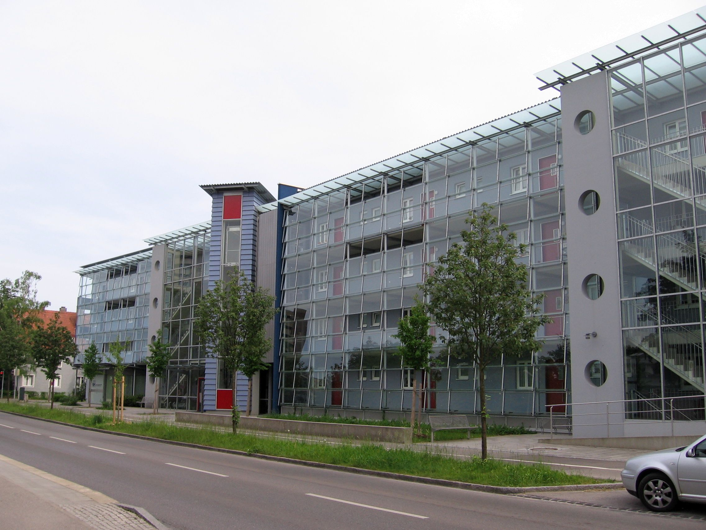 Zusehen ist ein modernes Altenheim in Haunstetten